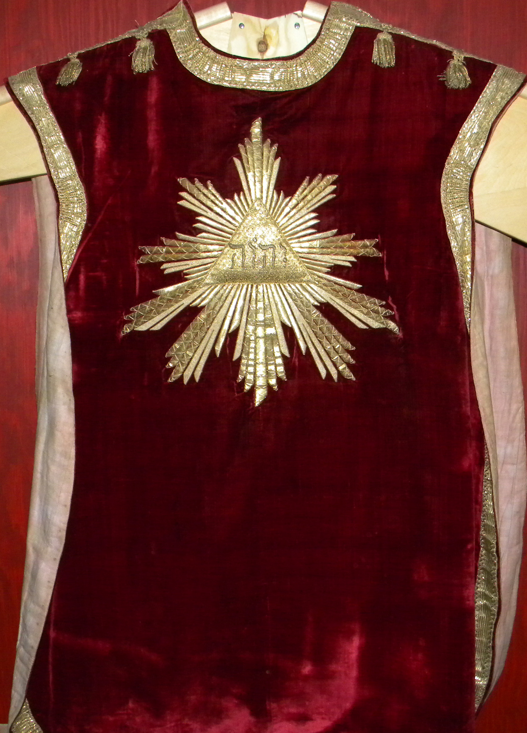 Mässhake med tetragrammet JHWH i Vårdsbergs kyrka